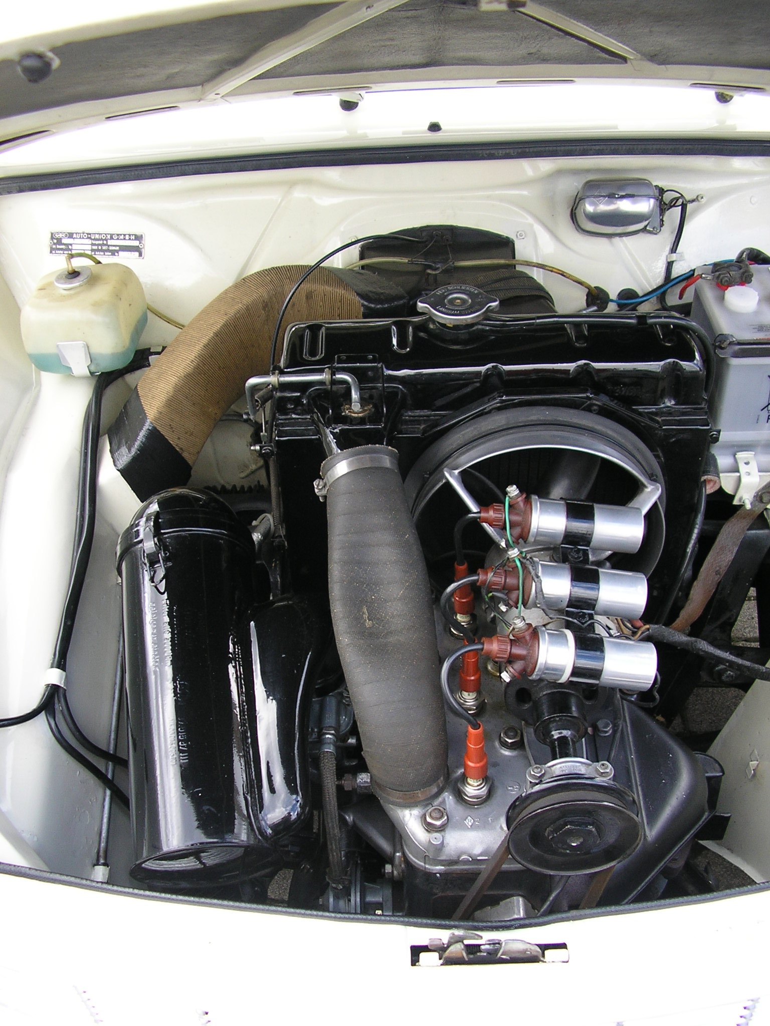 Zweitakt-Dreizylindermotor, DKW Junior de Luxe